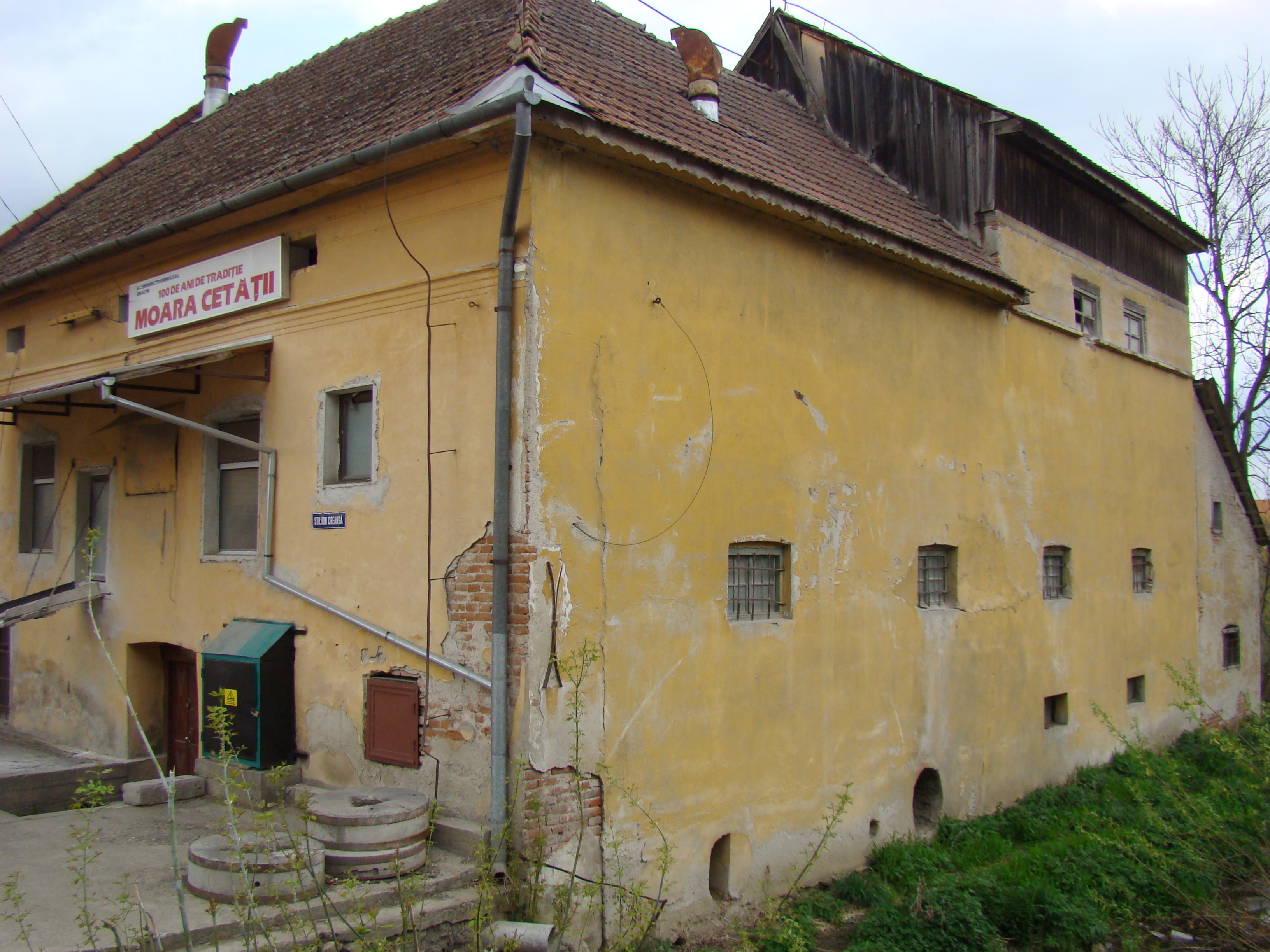 Ansamblul urban "Str. Ion Creangă" (detaliu: Moara cetății) 12